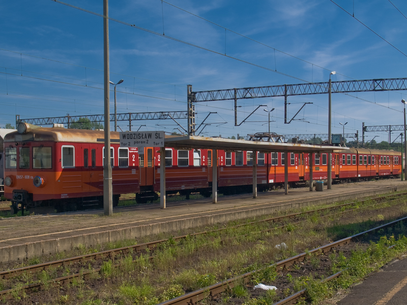 Parkujący pociąg na peronie 2 na dworcu kolejowym w Wodzisławiu Śląskim.